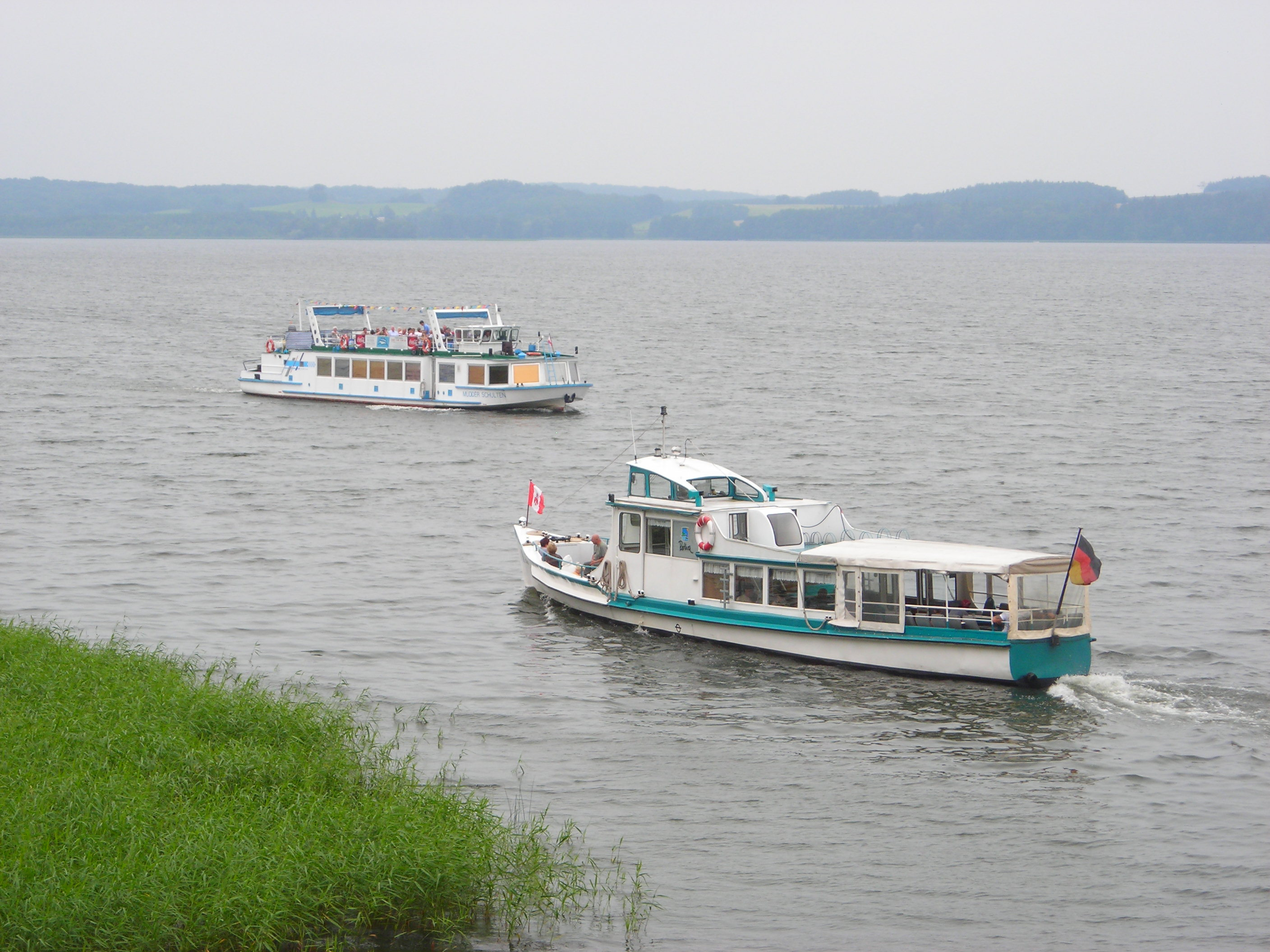 Die Motorschiffe Rethra (vorn) und Mudder Schulten passieren sich auf dem Tollensesee in der Nähe von Klein Nemerow